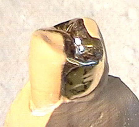 Inlay, Goldlegierung, inkagoldgelb